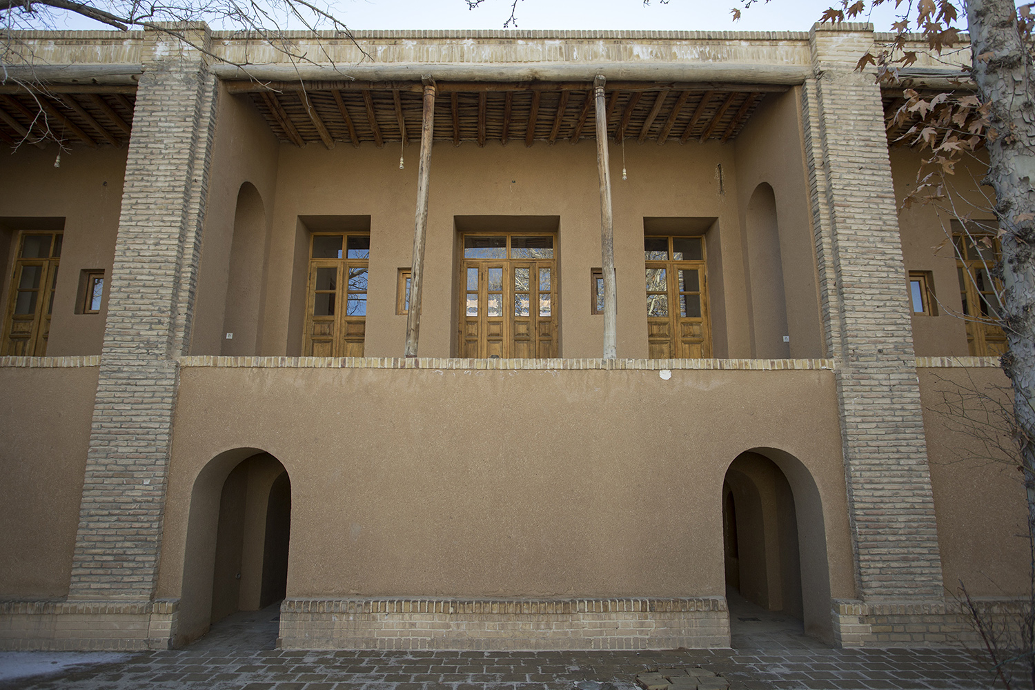 خانه سید روح‌الله خمینی (خمین)